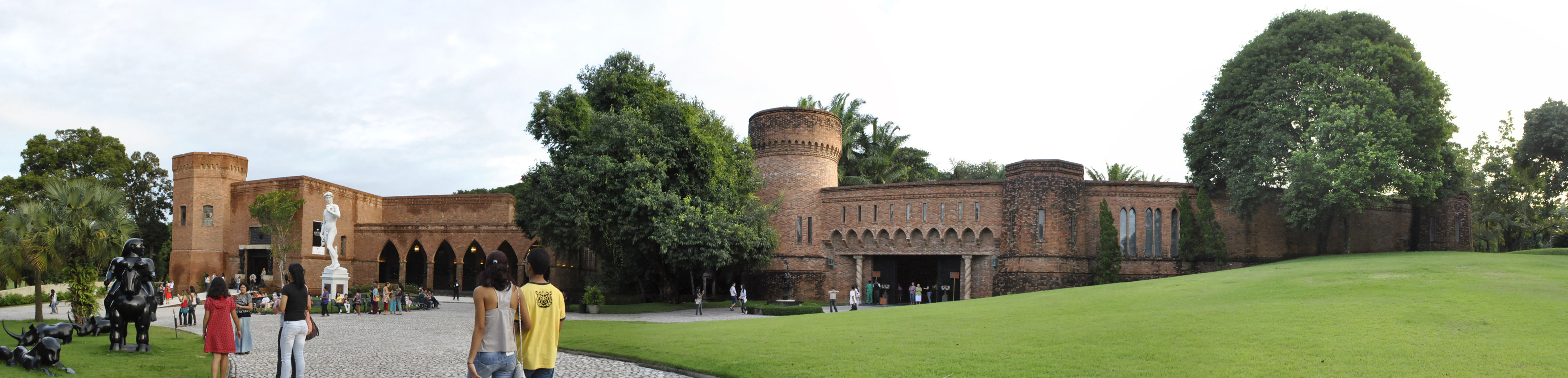 Castelo Brennand (Instituto Ricardo Brennand) - Recife - Pernambuco - Brasil